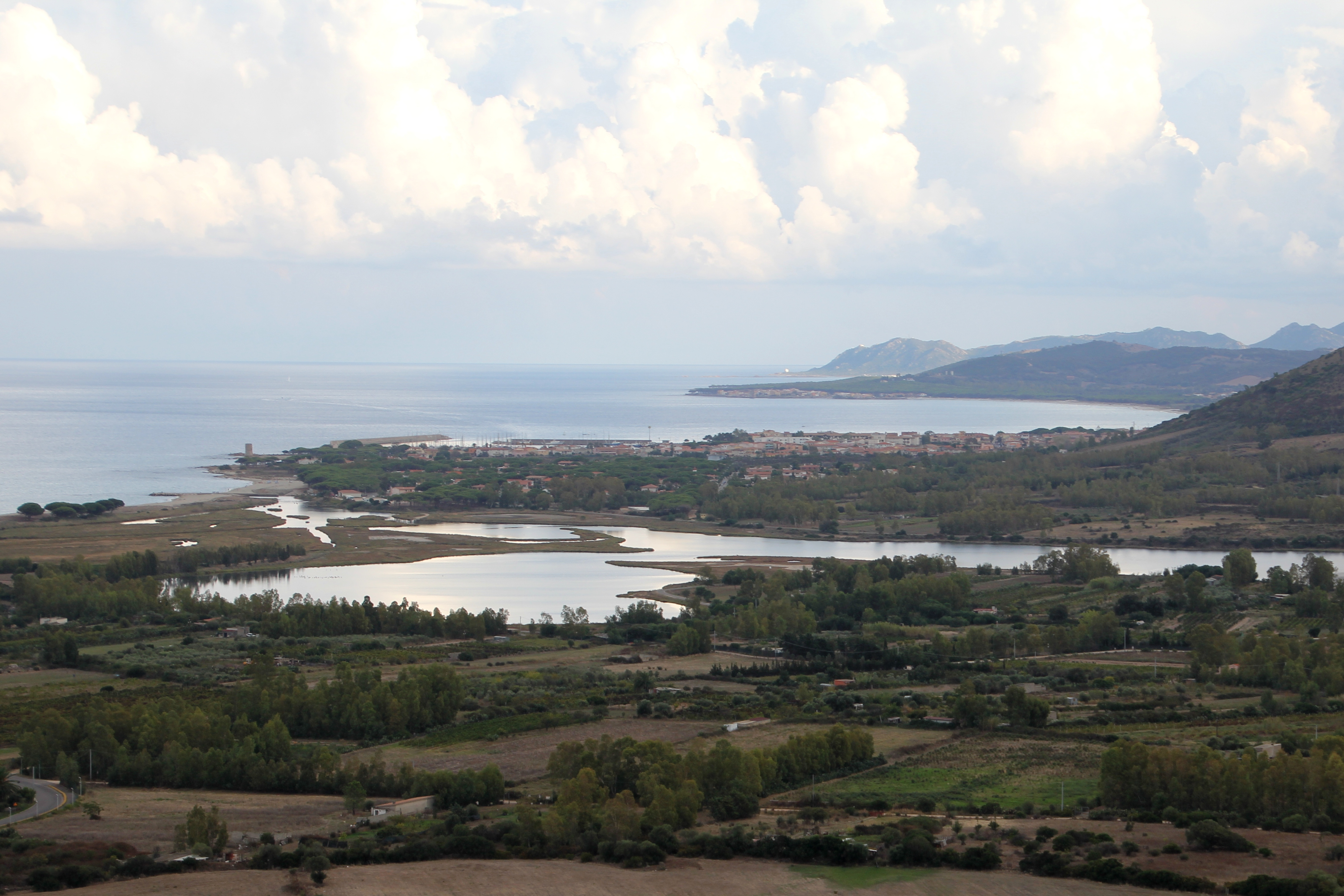 Posada, frazione San Giovanni